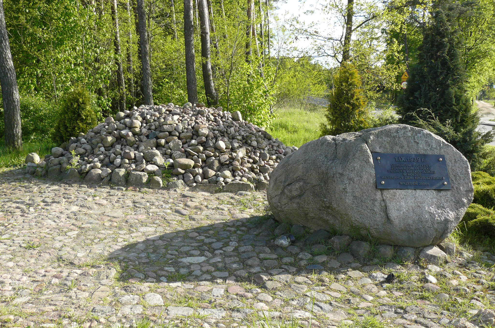 Szaniec Pamięci Żołnierzy 56. Pułku Piechoty Wielkopolskiej w Krotoszynie (ul. Gajowa/Bolewskiego).